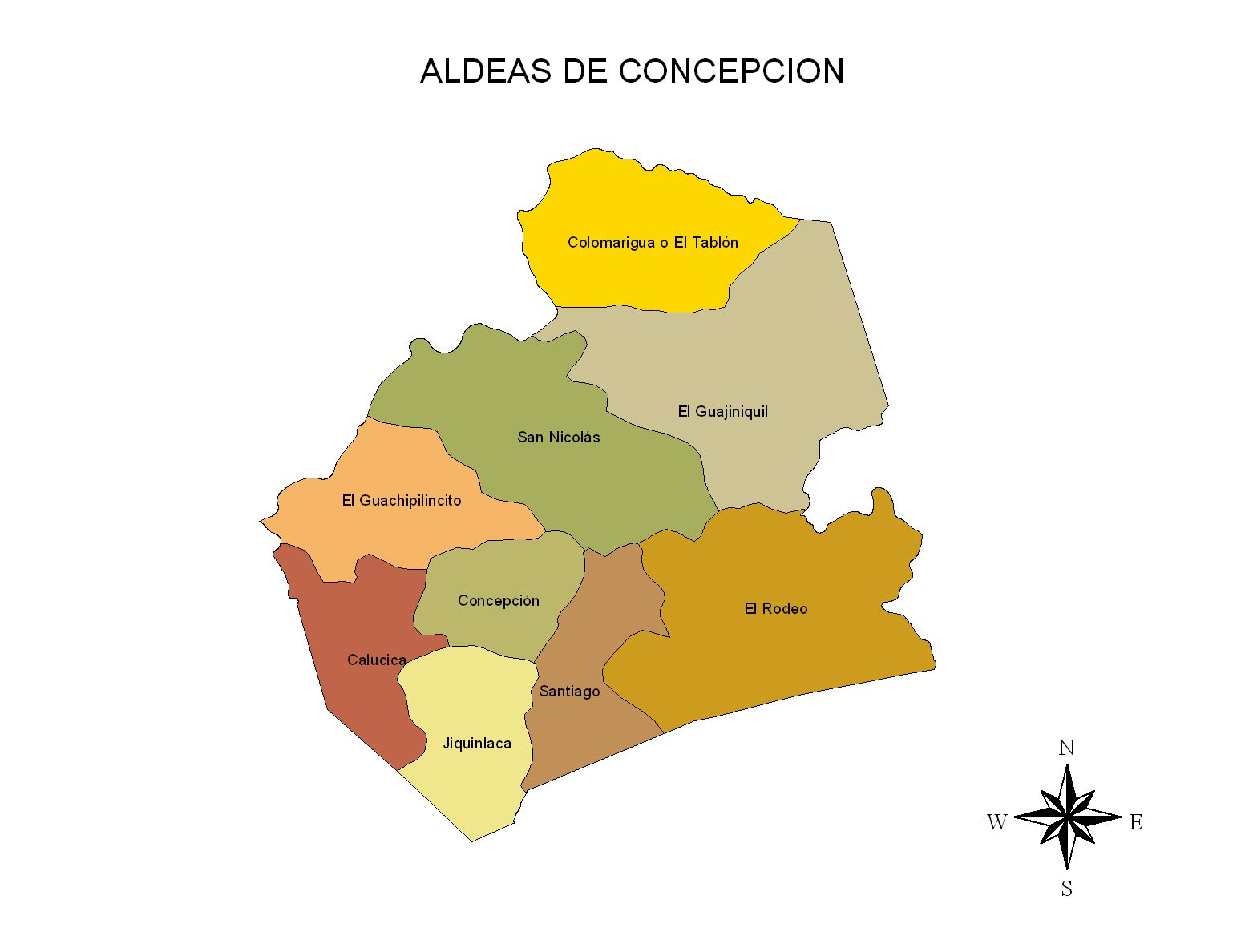 Concepcion y sus Aldeas